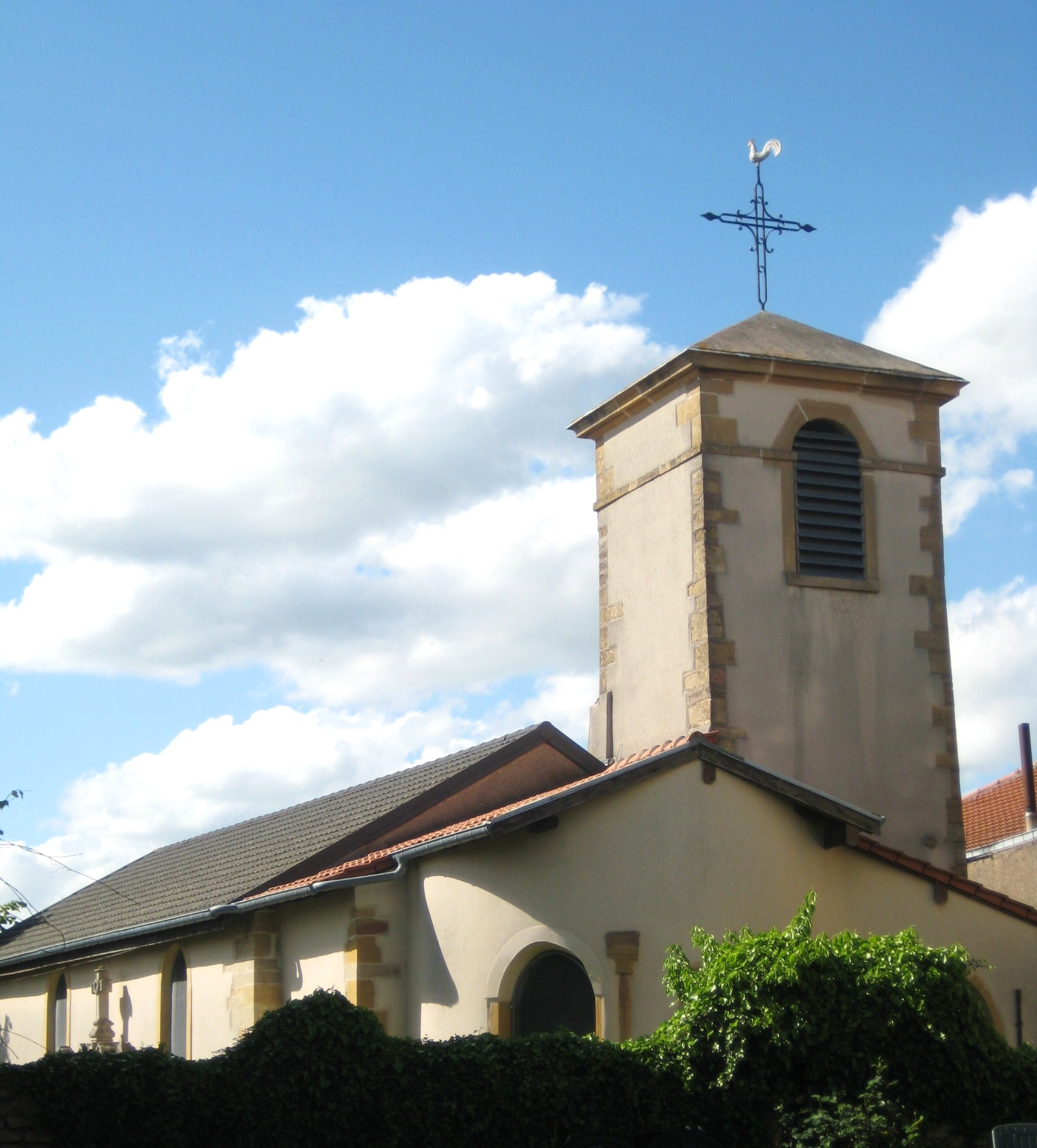 Description Église de Saint-Ail Date18 May 2009Sourcemon appareil photoAuthorAimelaime Église de Saint-Ail